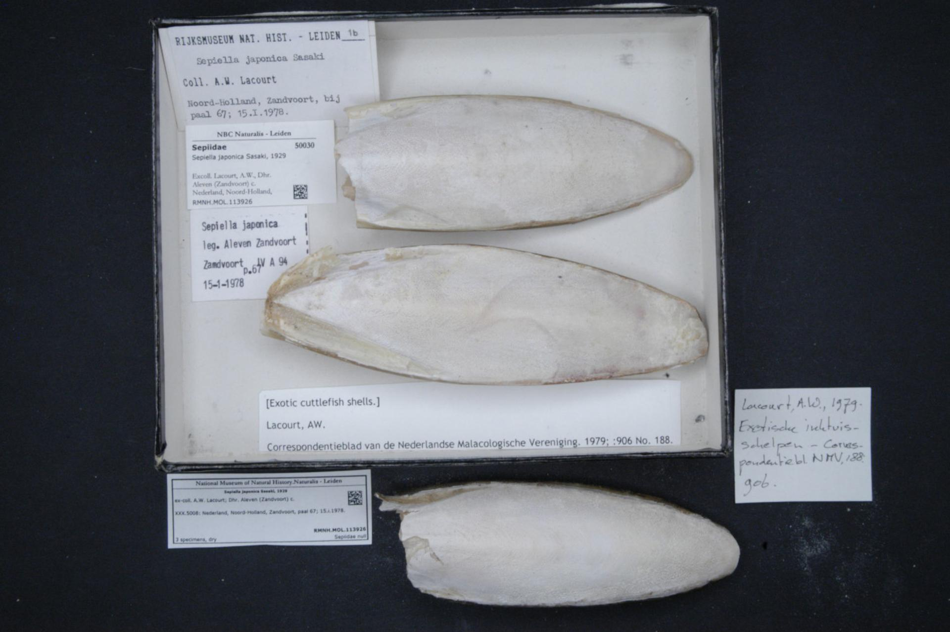 Sepiella japonica Sasaki, 1929